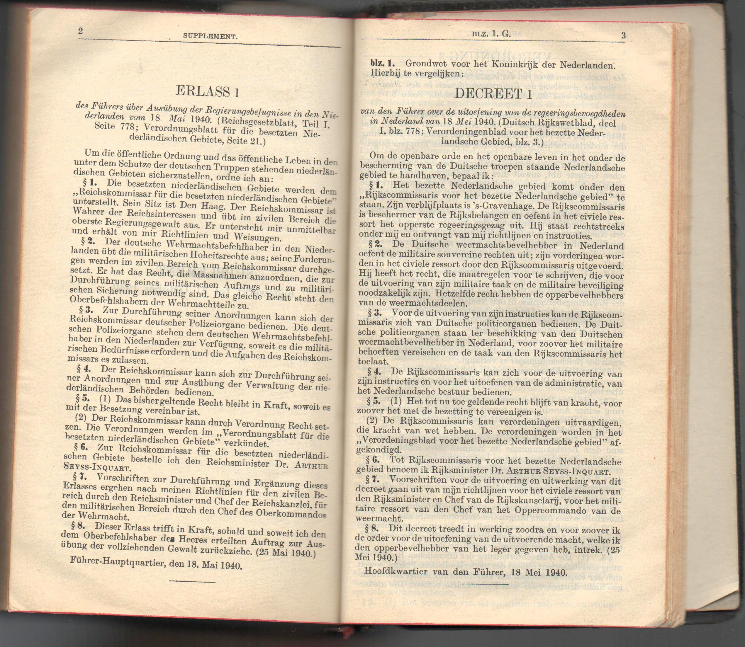 pagina 2 van de door hitler ingestelde decreten met links de duits talige verordening en recht de nederlandse vertaling. dit suplement was achterin het wetboek toegevoegd